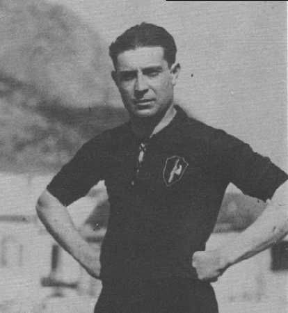 Il calciatore Giovanni Frangipane Frangipane, Giovanni